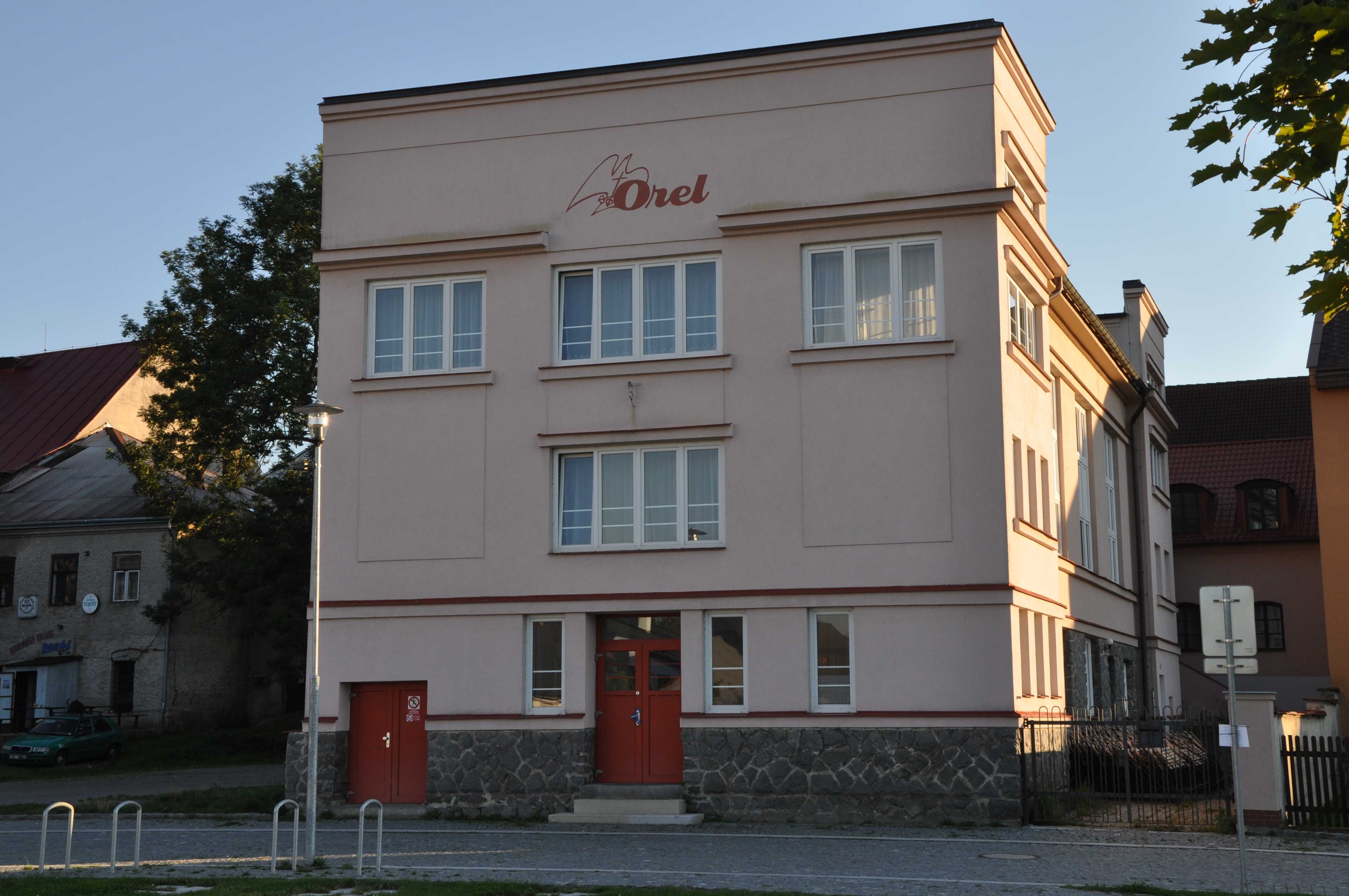 Hlinsko, Na Řekách 1109, orlovna.